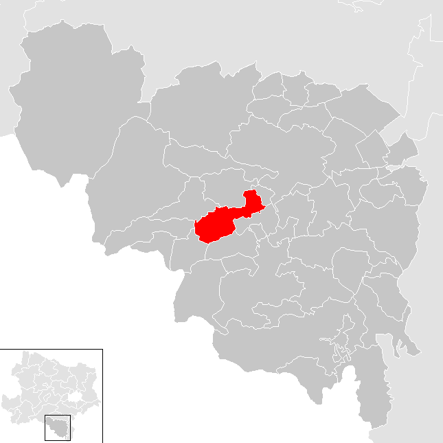 Bezirk Neunkirchen